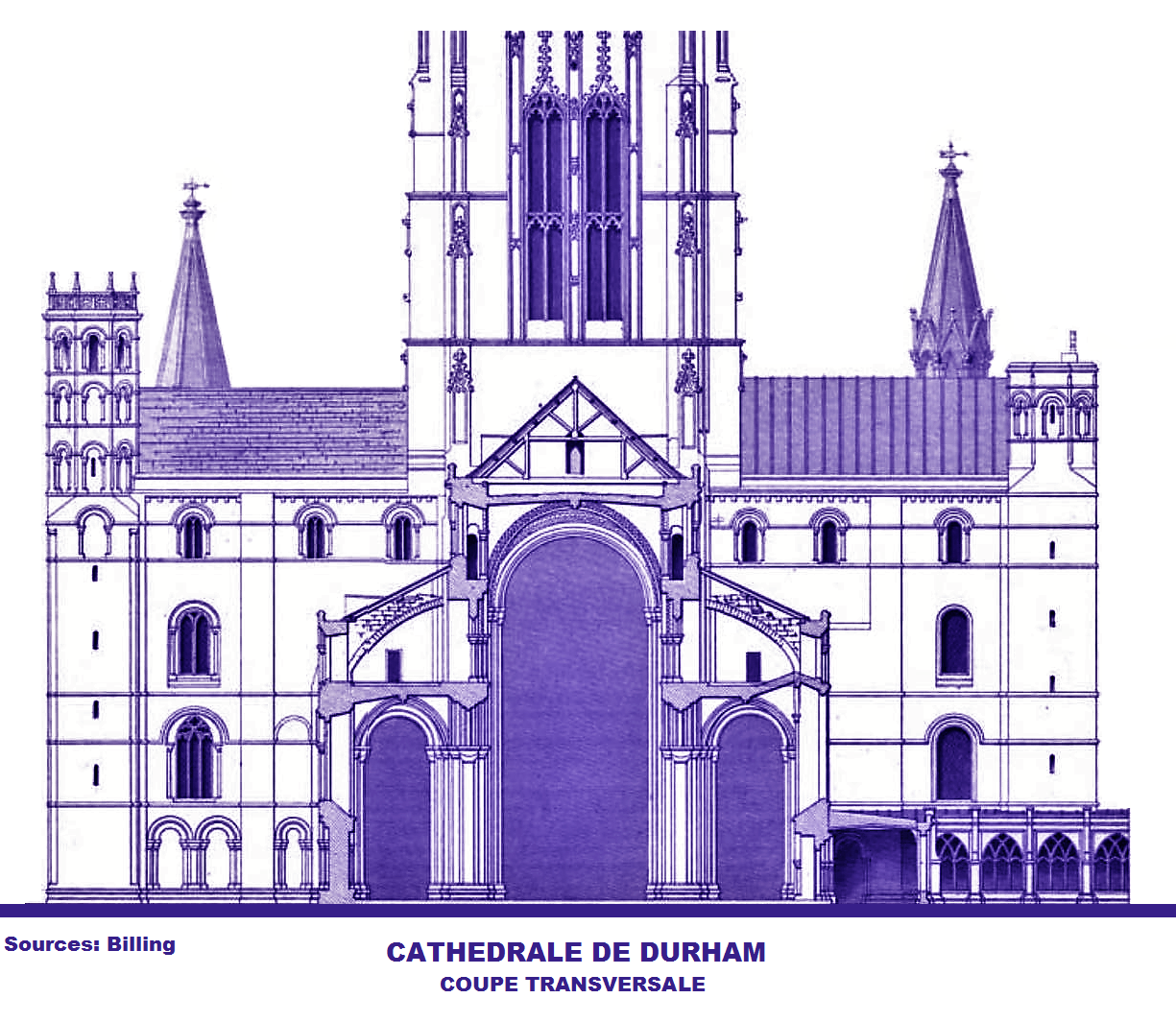 Cathédrale de Durham, Coupe transversale (image du domaine public (Billing, 1845) modifiée)